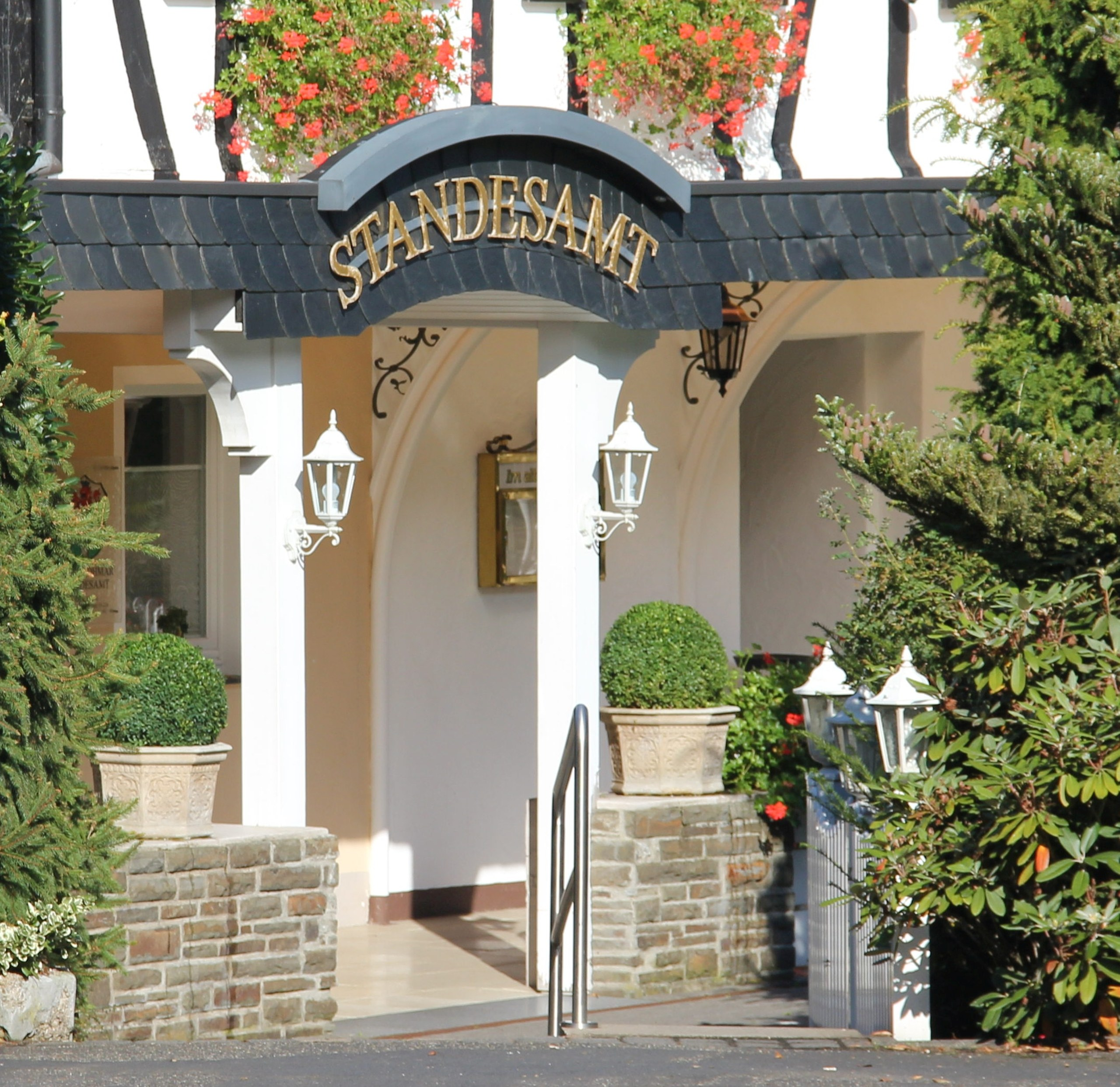 Standesamt Außenstelle Naafshäuschen am 7. Oktober 2013